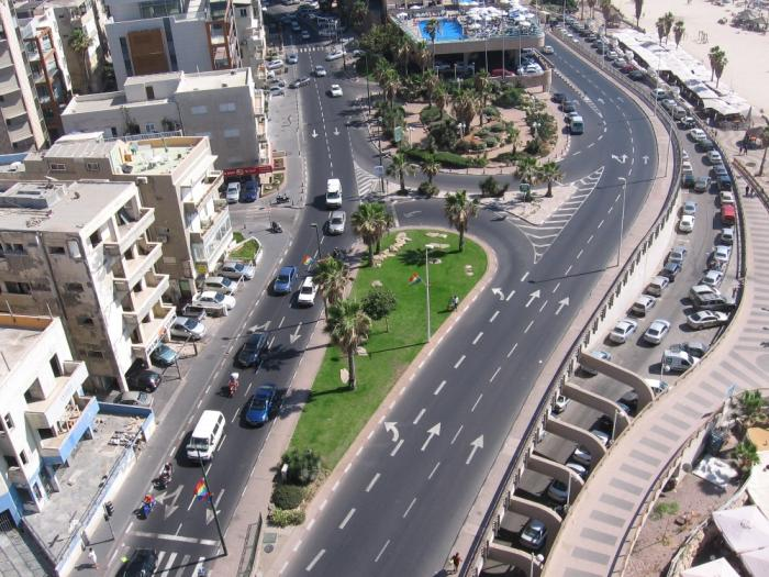 ליד בתי המלון